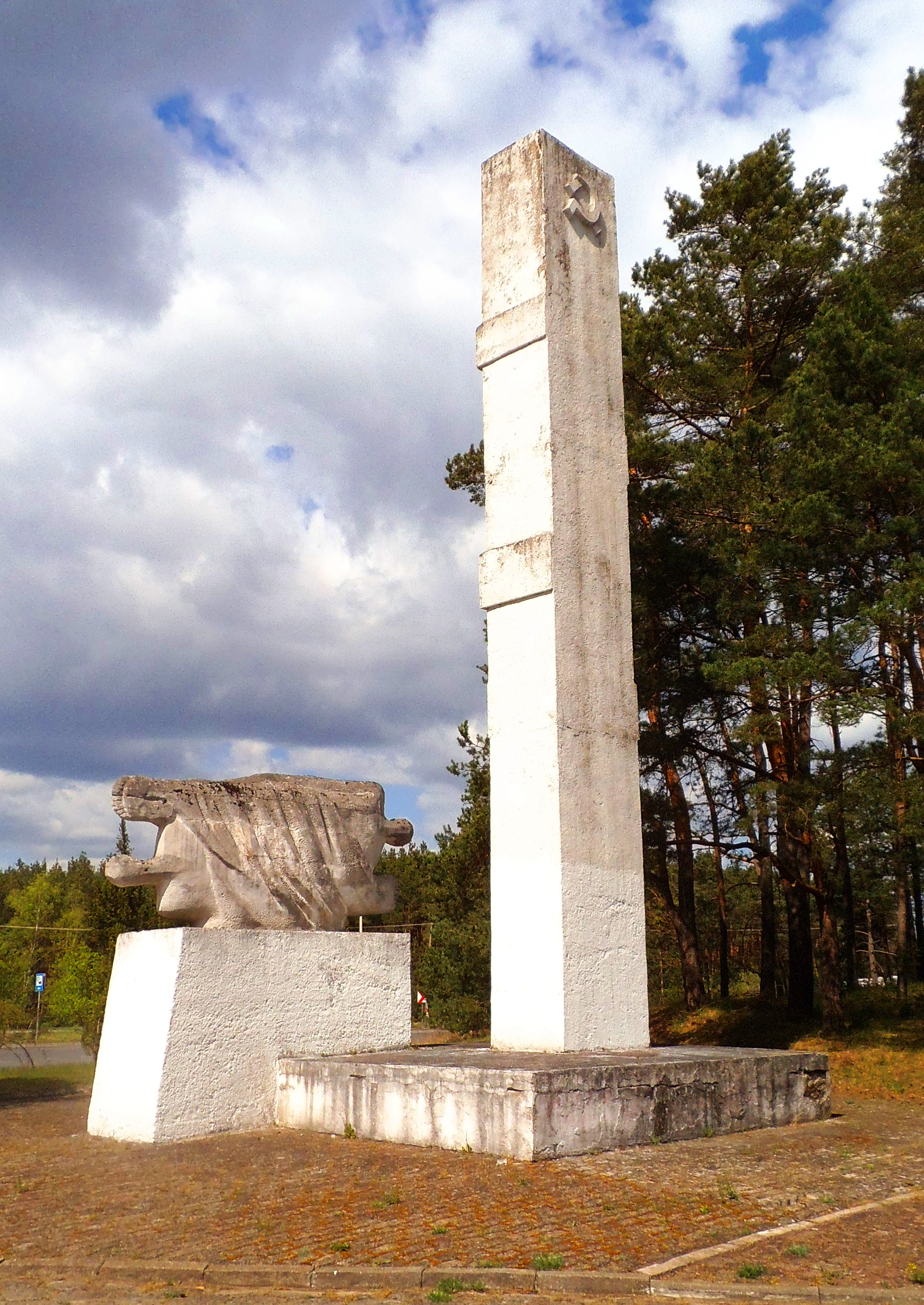 Pomnik poległych żołnierzy i jeńców Armii Radzieckiej pod Toruniem